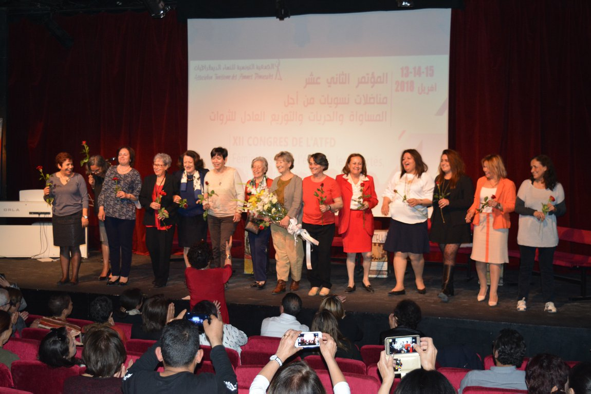 12 ème congrès de l'Association Tunisienne Des Femmes Démocrates. à Hotel Golden Tulip El-Mechtel. Tunis, le 13 Avril 2018